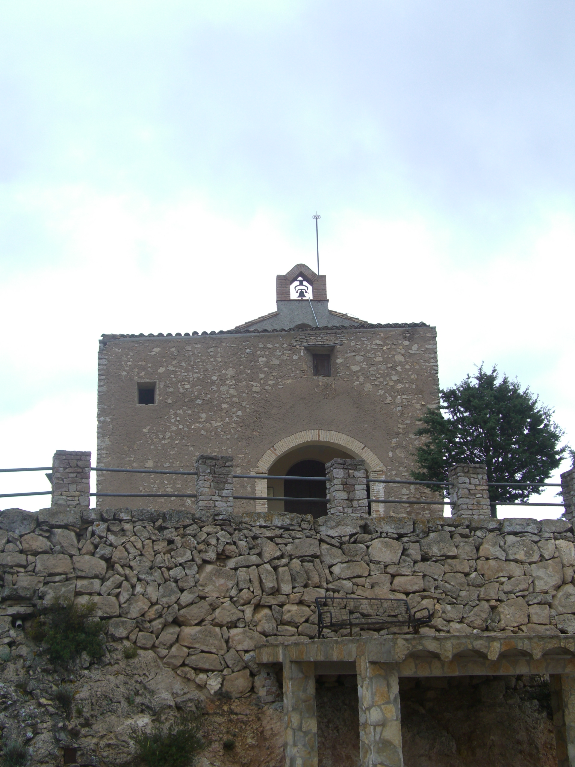 Ermita de Sant Pau (la Figuera, Priorat, Catalunya)